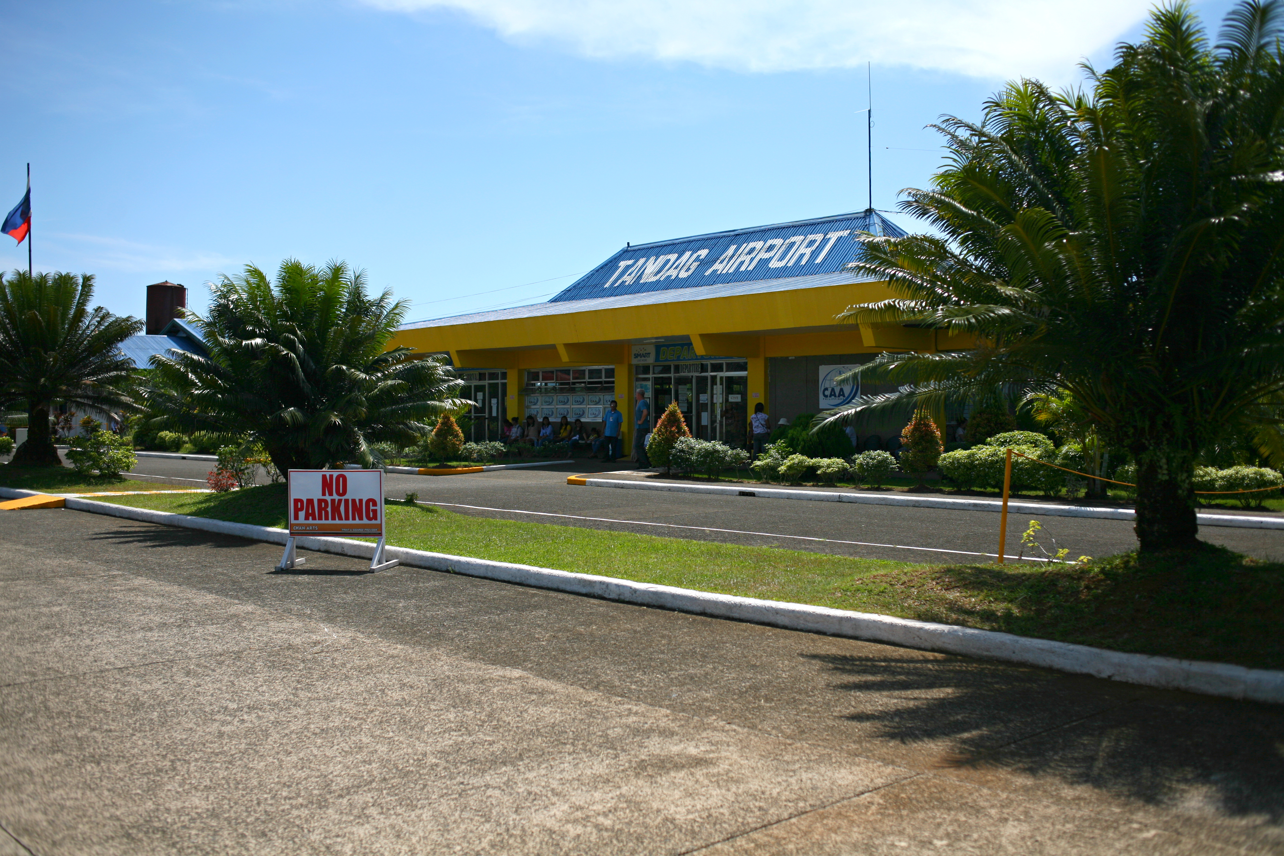 Aeroporto di Tandag esterno